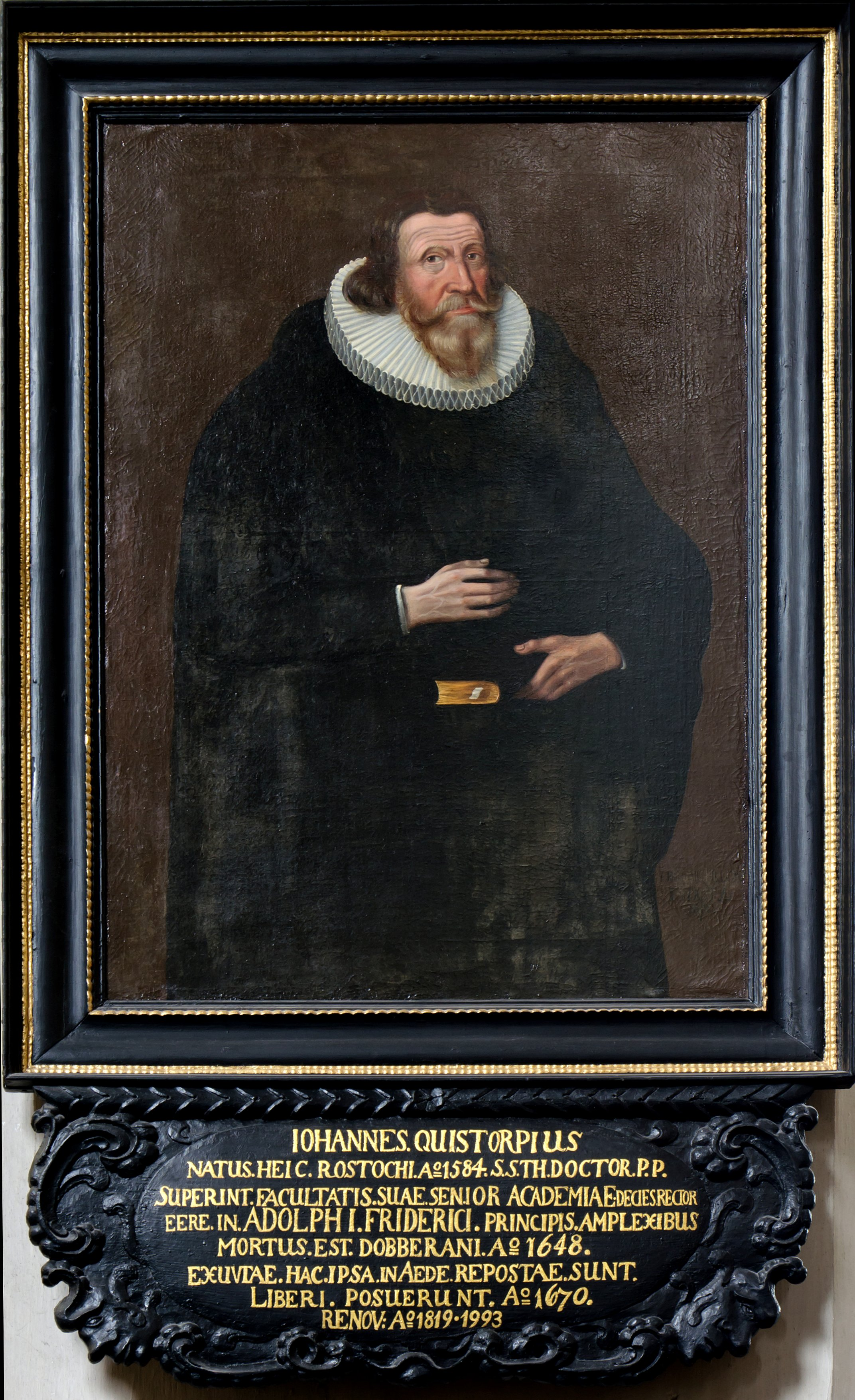 Rostock St.Marien Johann Quistorp der Ältere